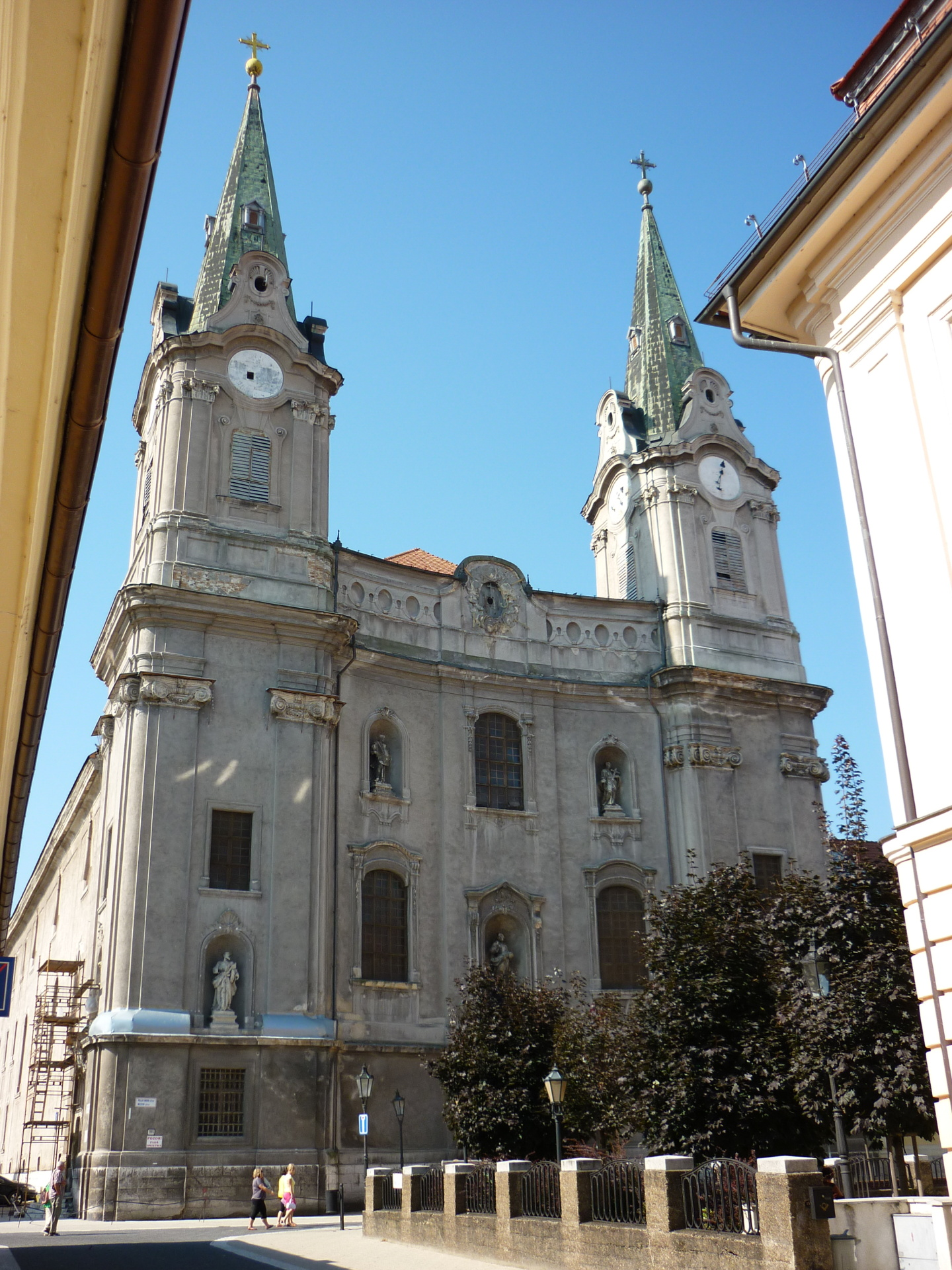 Komárno - kostel sv. Ondřeje